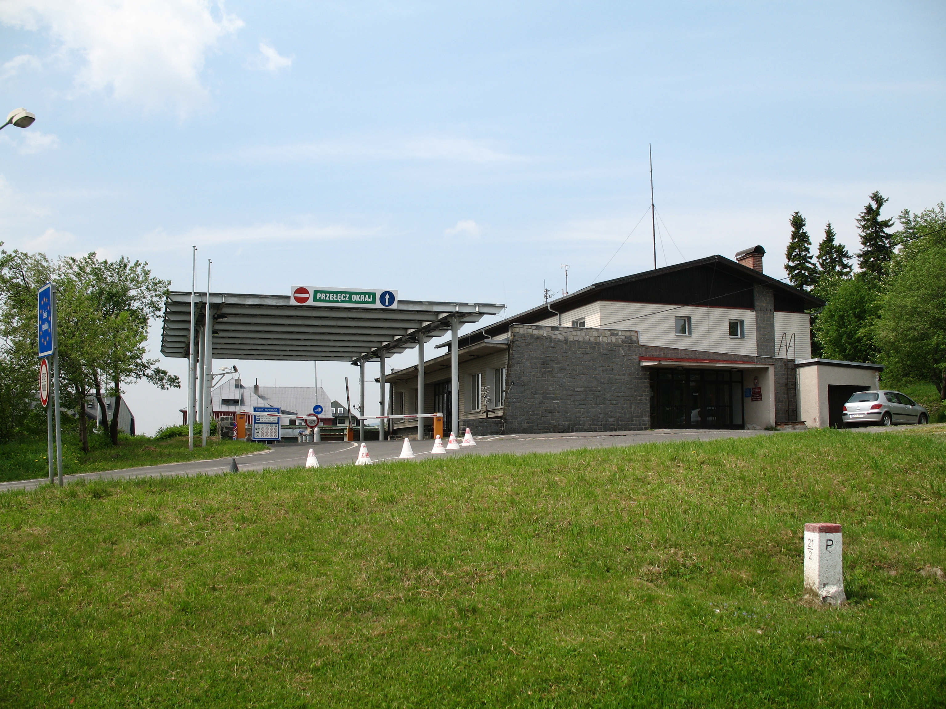 Przejście Graniczne na Przełęczy Okraj.